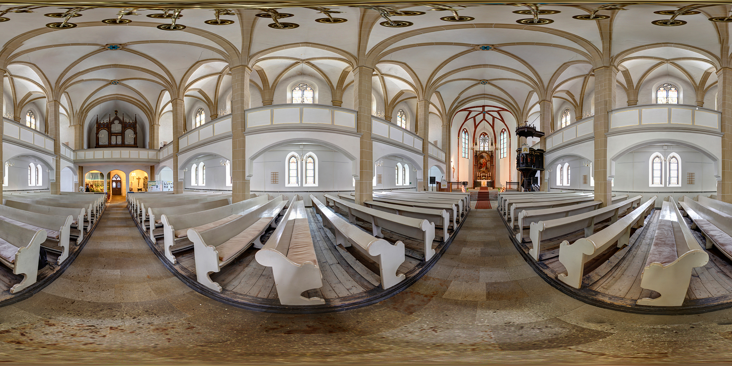 B360°xH180°-Gesamtansicht des Innenraums der Martin-Luther-Kirche Oberwiesenthal